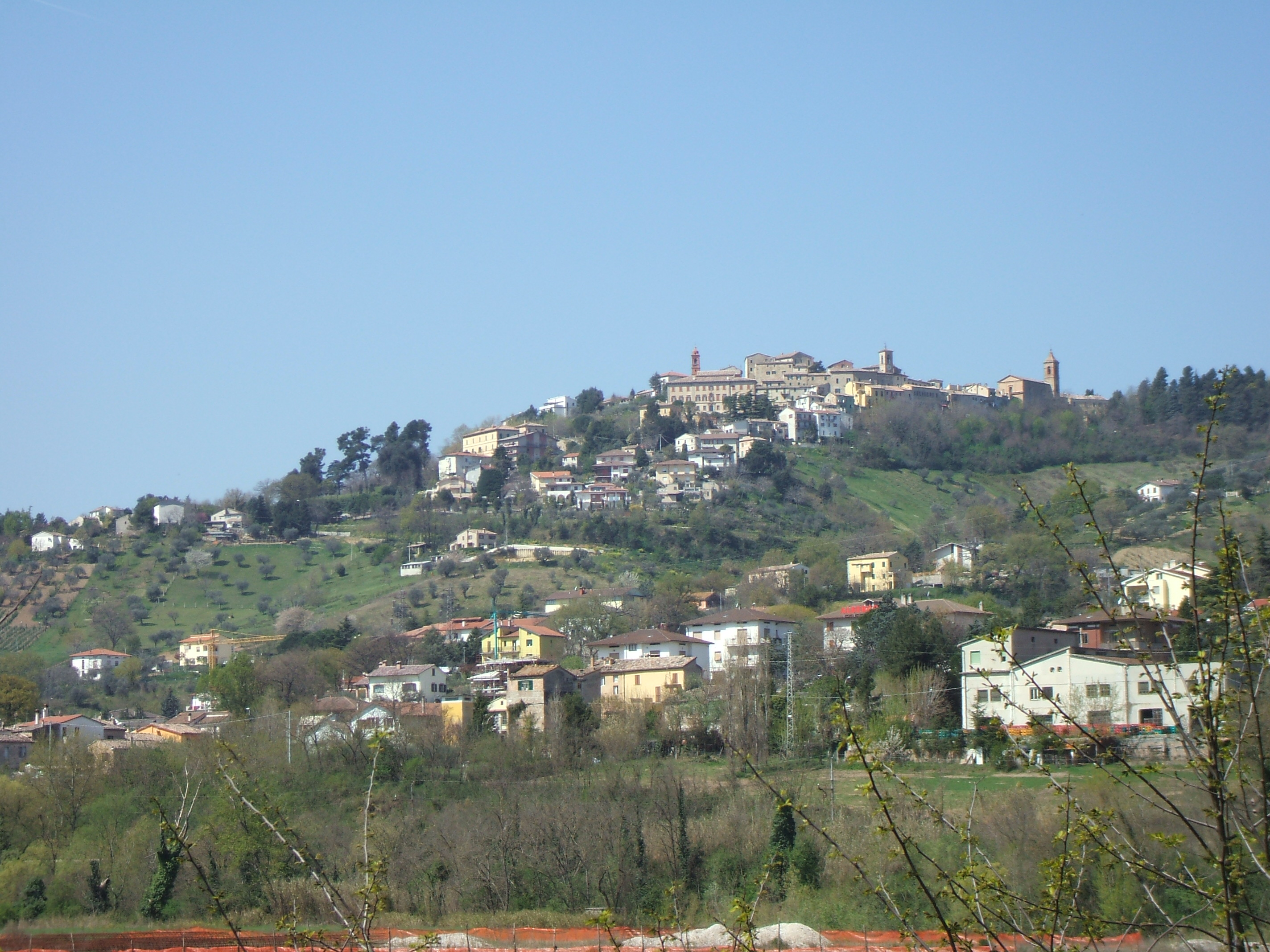 Panorama di Castelplanio